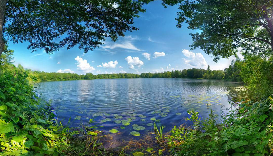 Naturschutzgebiet „Gießener Bergwerkswald“ (NSG 1531002)